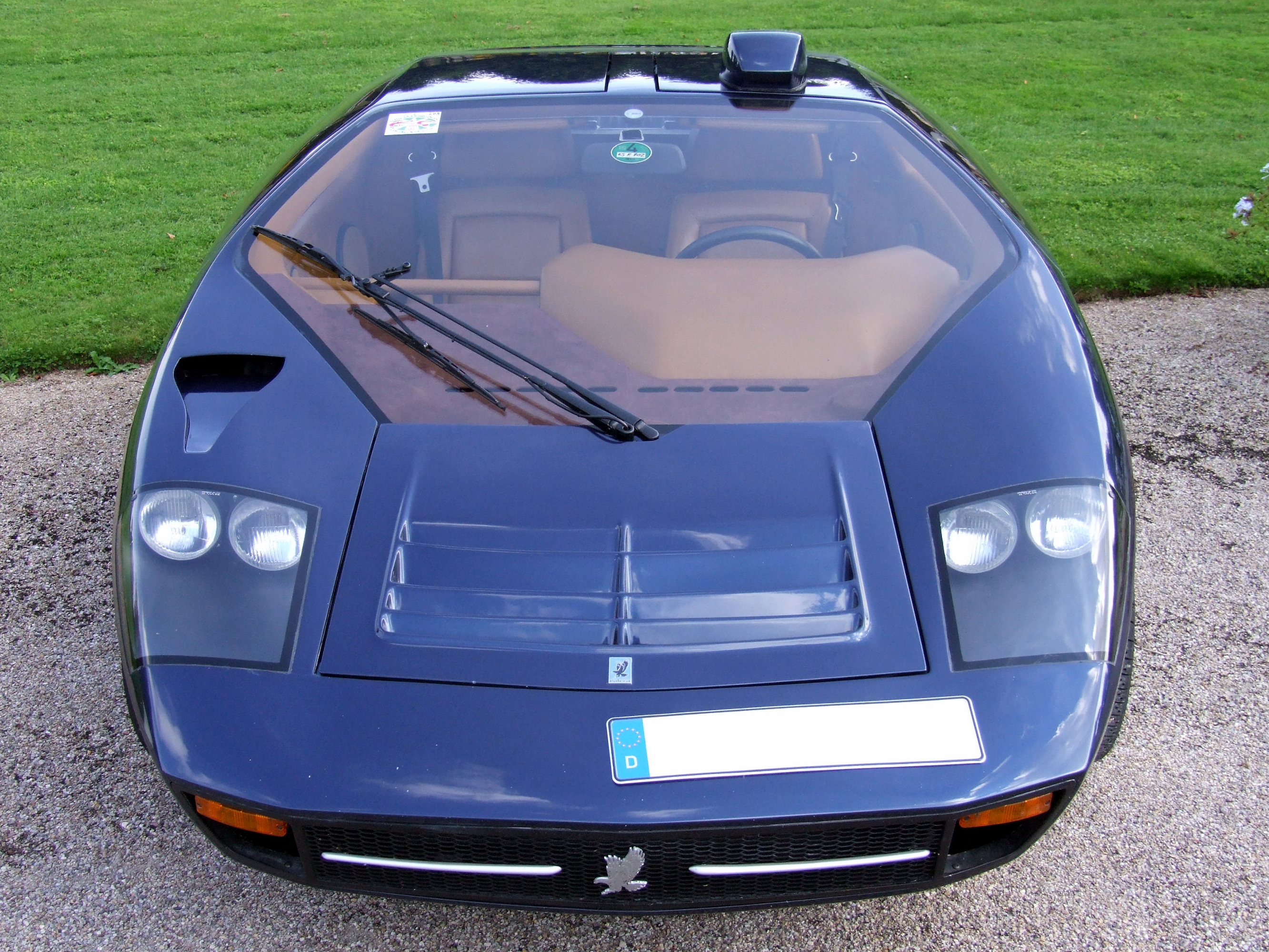 Isdera Imperator 108i Serie 1 (1984 - 1991)